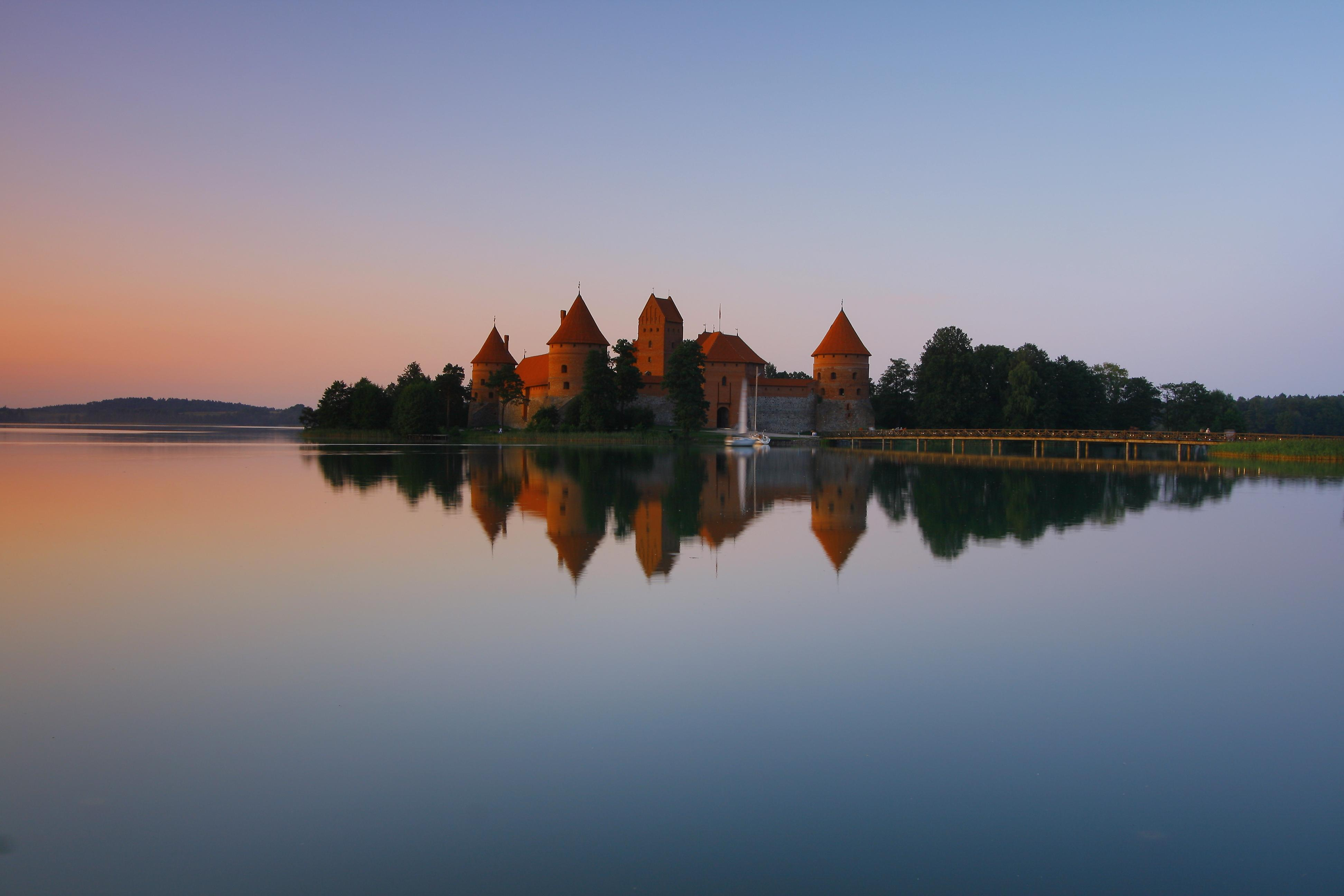 Trakai, Lithuania